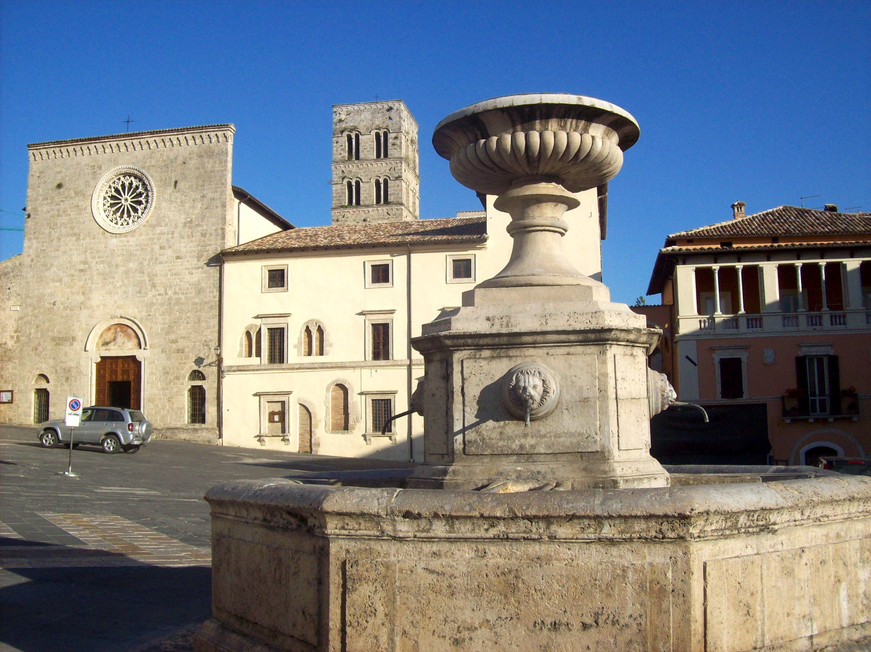 Veduta del lato sud-est di piazza del Popolo in Cittaducale (RI) con la fontana e, in secondo piano, la Chiesa Collegiata di "Santa Maria del Popolo" e il Palazzo Vescovile.